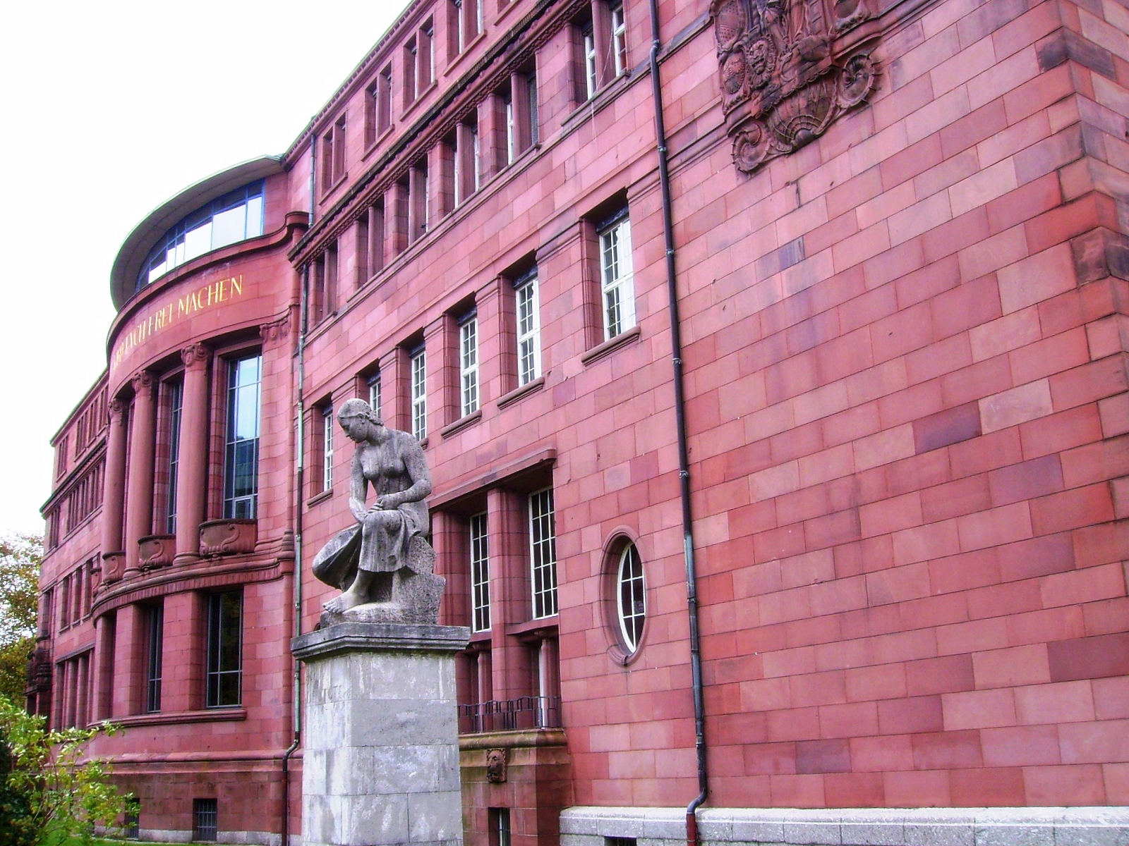 Universität Freiburg i. Br., Kollegiengebäude I